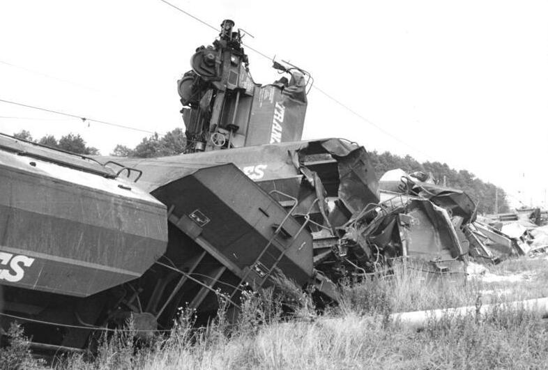 ADN-ZB Pätzold-6.10.1987-A-Bez. Schwerin: Zugunglück-Zwischen den Bahnhöfen Schwaan und Bützow entgleisten 24 mit Kohle beladene Wagen eines Güterzuges, wobei zehn umstürzten und ein Streckenwärter leichte Verletzungen erlitt.